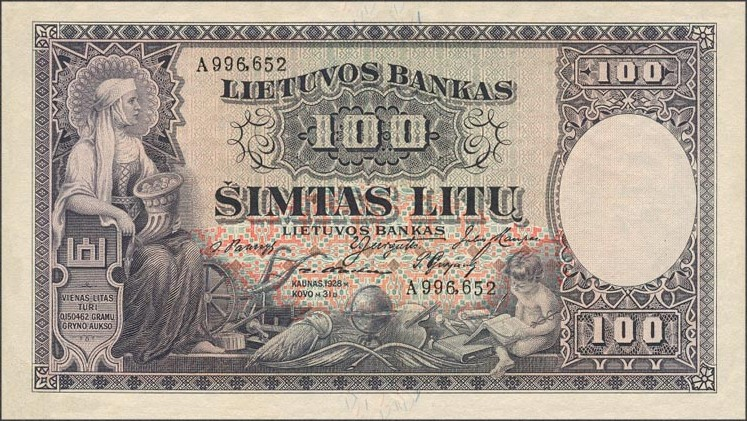 Lithuania 100 litas 1928